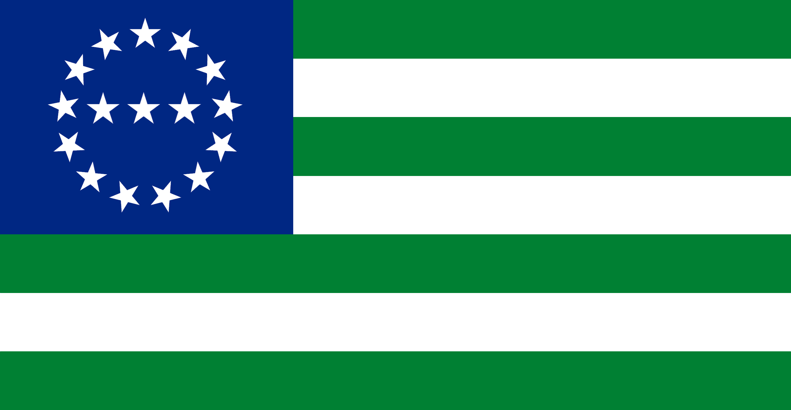 Флаг Конфедерации горских народов Кавказа